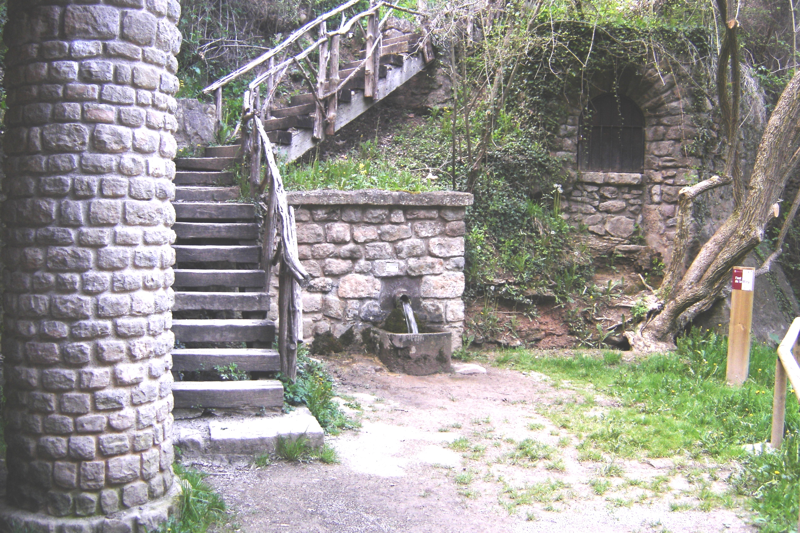 L'entorn de la font de la Mina, a Solsona (Solsonès). Les escales, la font i la mina